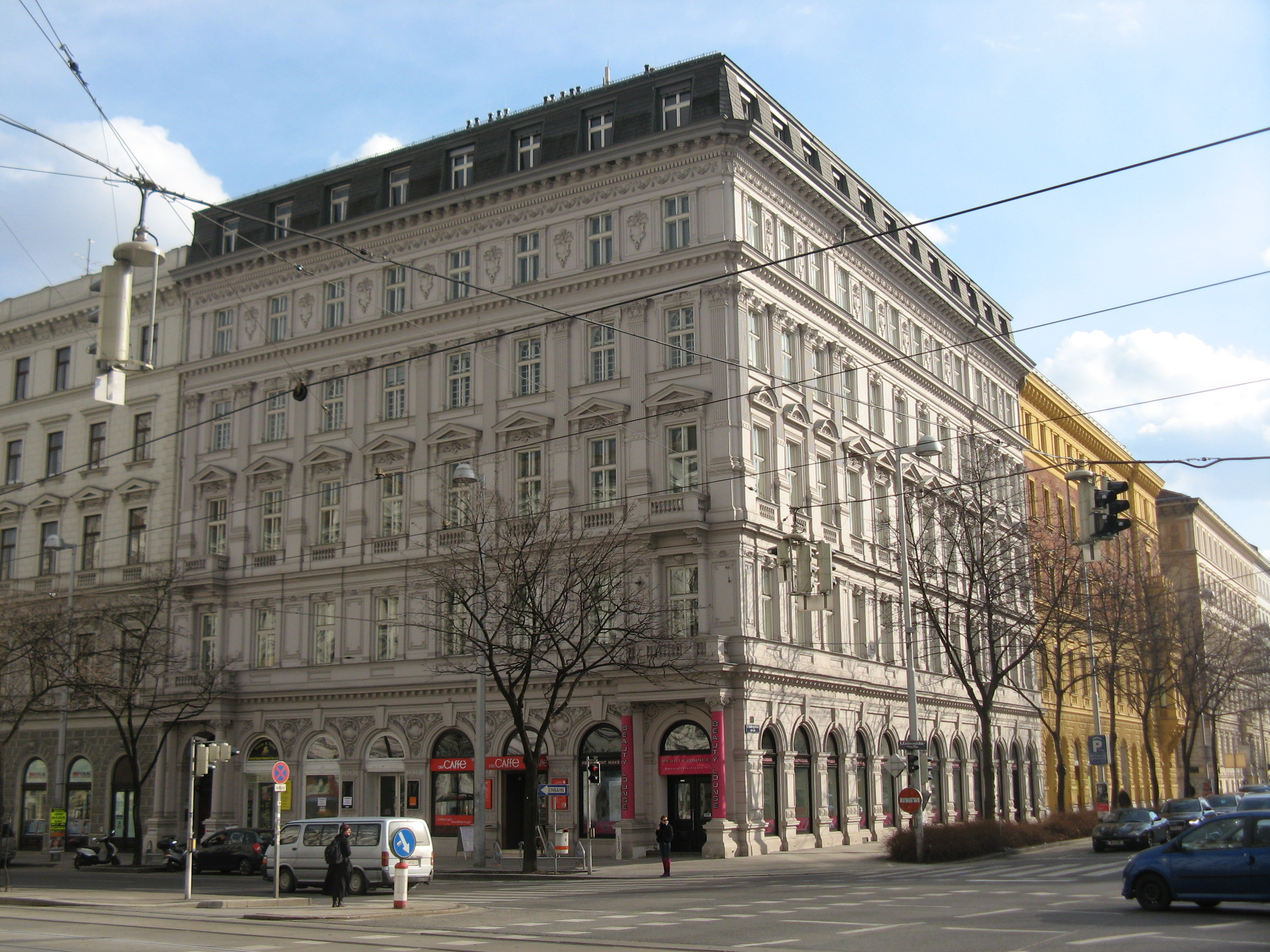 Haus (1880-81) von Ludwig Tischler, Universitätsstraße 11, Wien-Innere Stadt